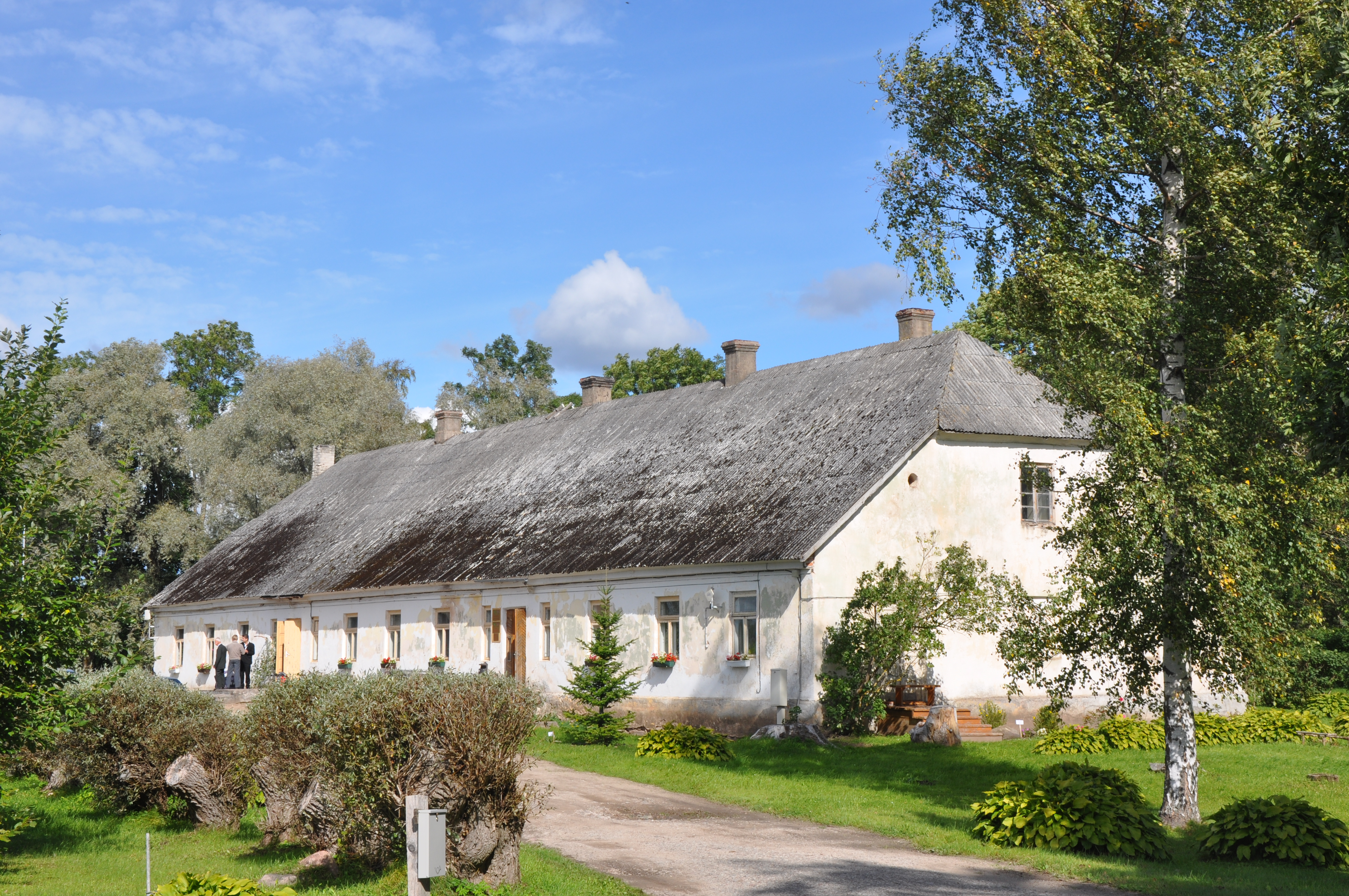 Pļavu pusmuiža, - bijusī skola un tagad bibliotēka, Laucienes pagasts, Talsu novads, Latvia